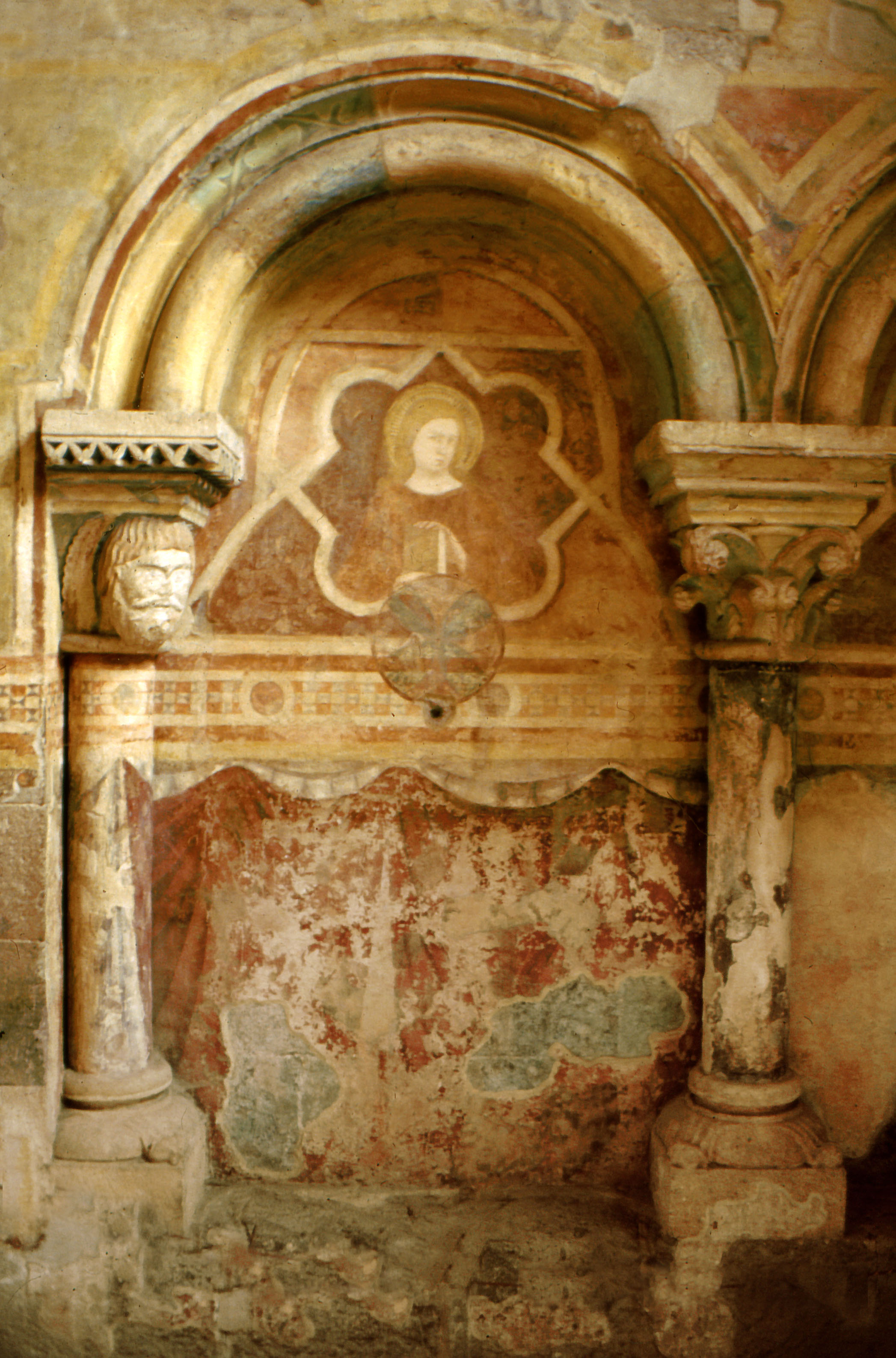 Esztergom, várkápolna, középkori ülőfülke